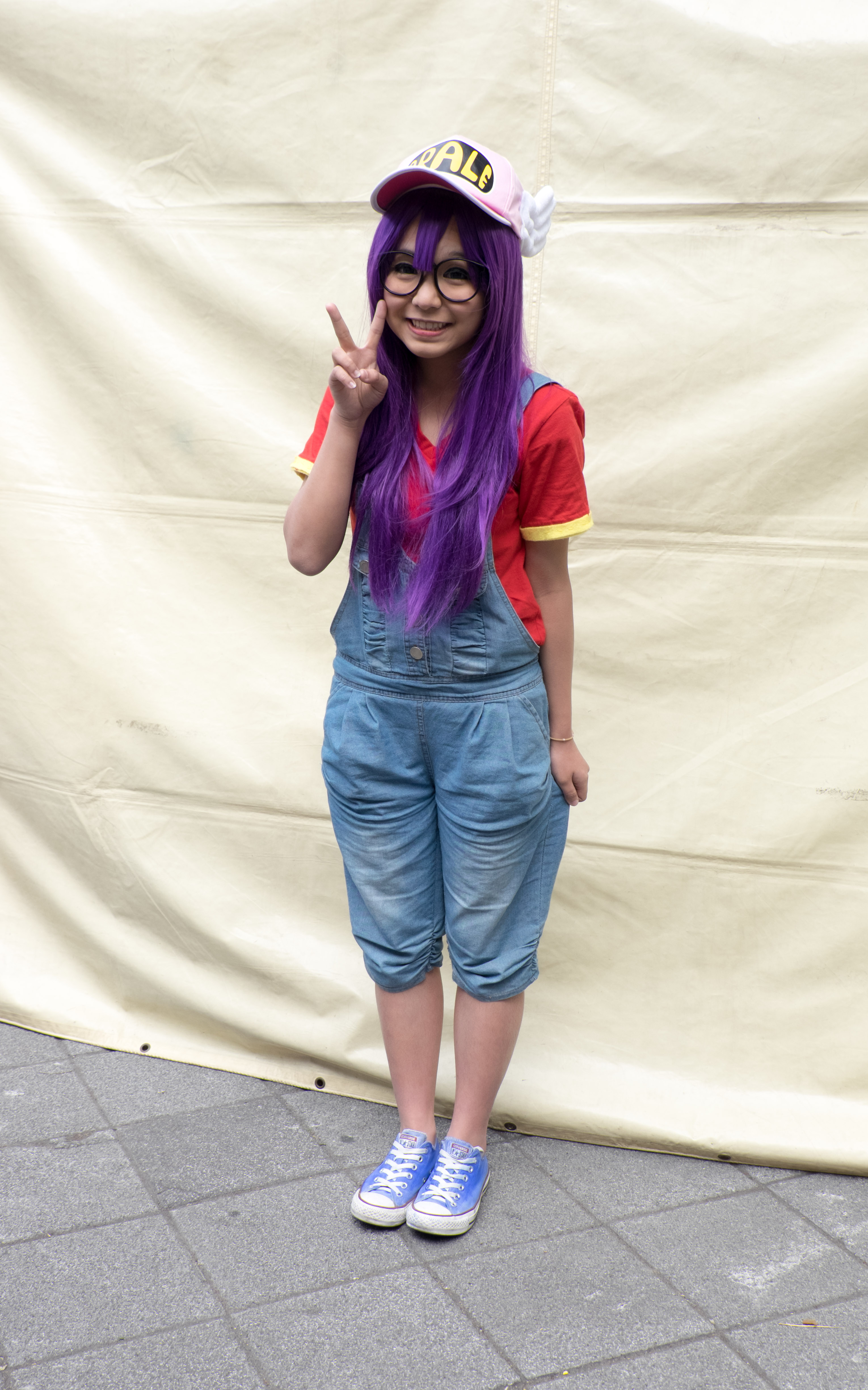 Fancy Frontier 25第二日，＜Dr.スランプ アラレちゃん＞則巻アラレCosplayer。